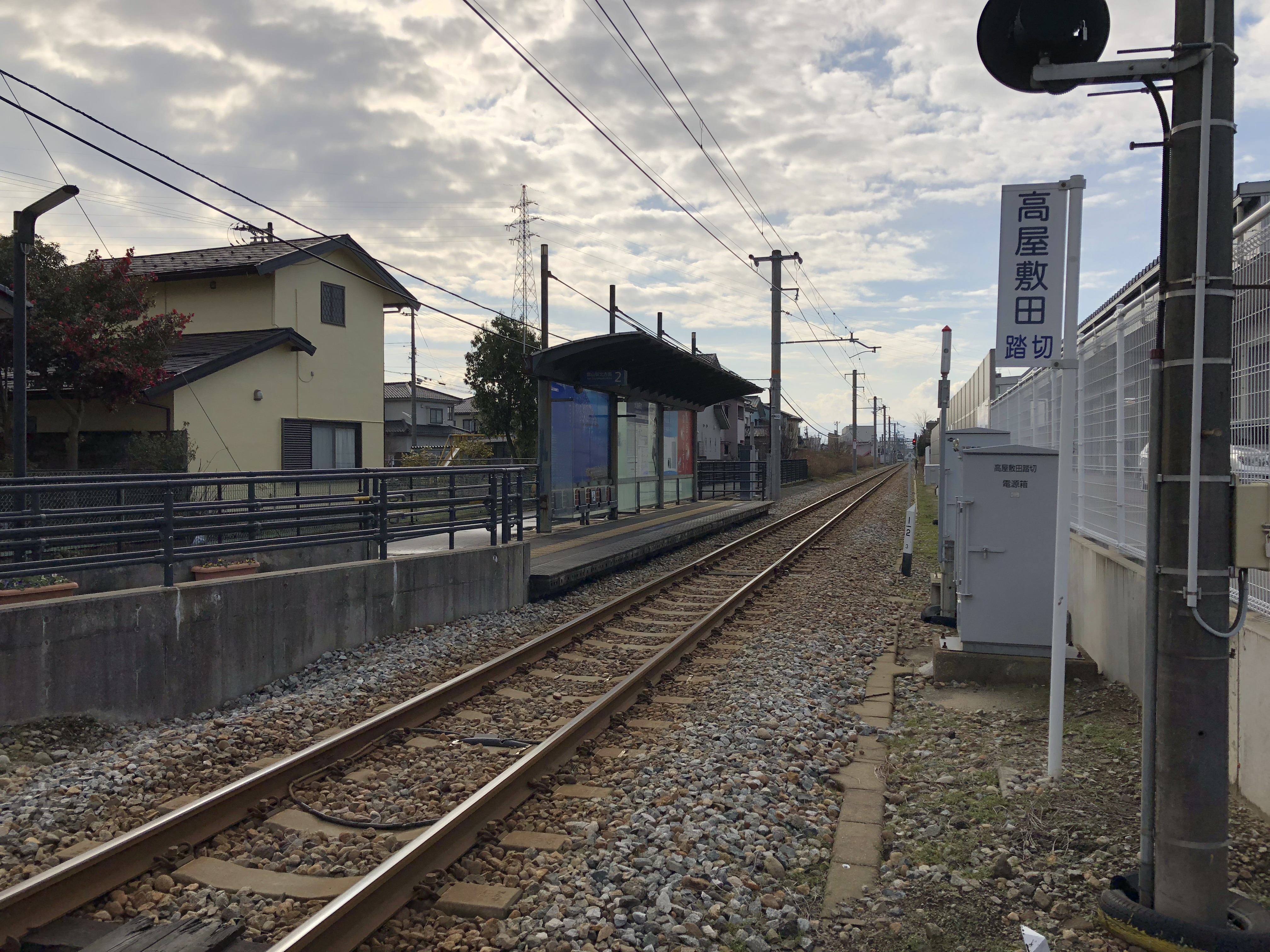 富山ライトレール富山港線犬島新町駅